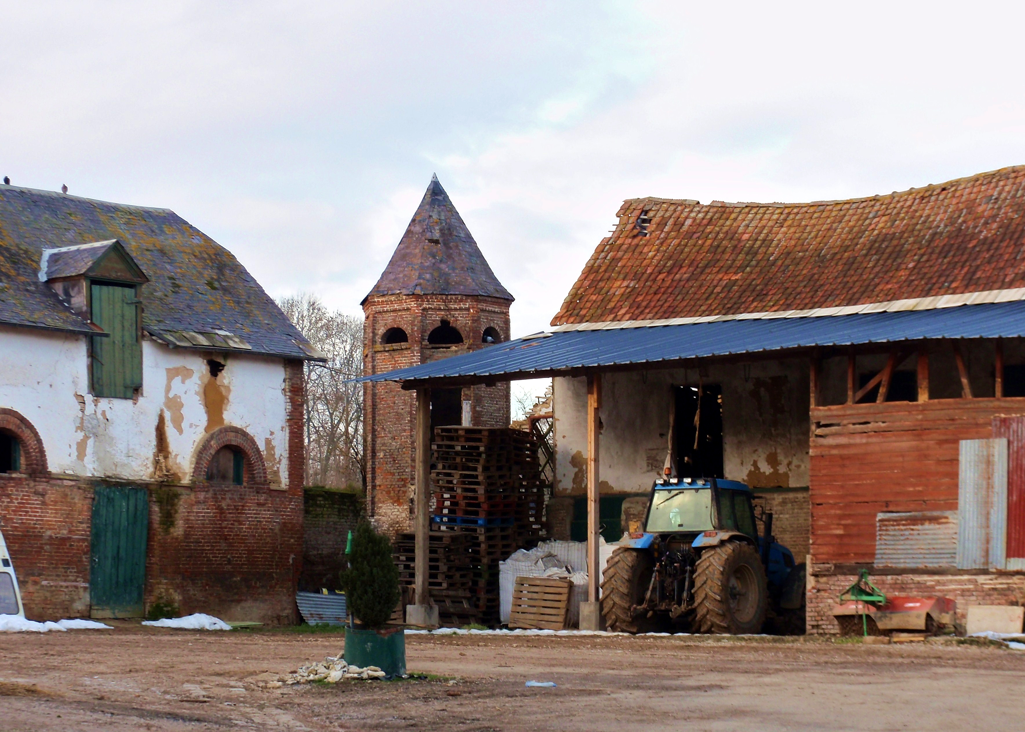 Brucamps (Somme, France). Colombier à l'abandon dans une cour de ferme.